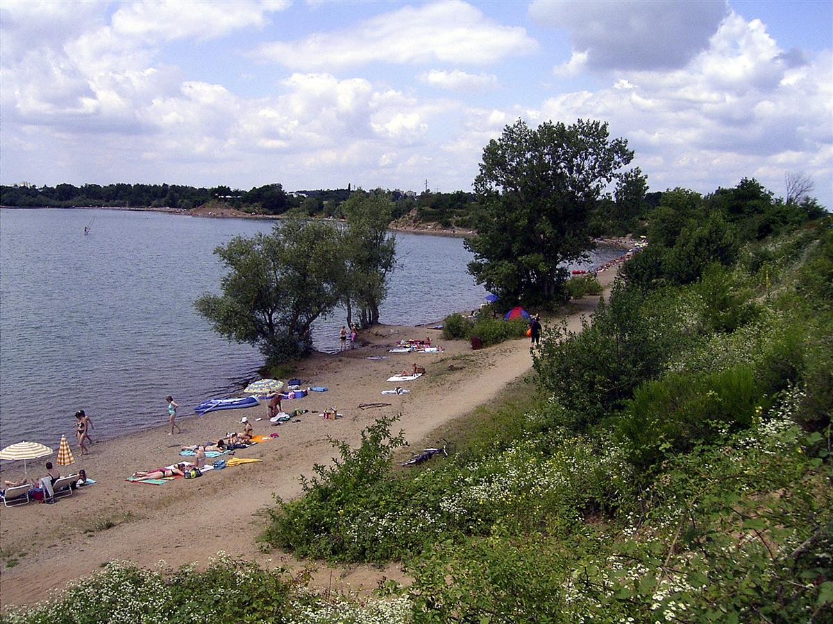 Epplesee